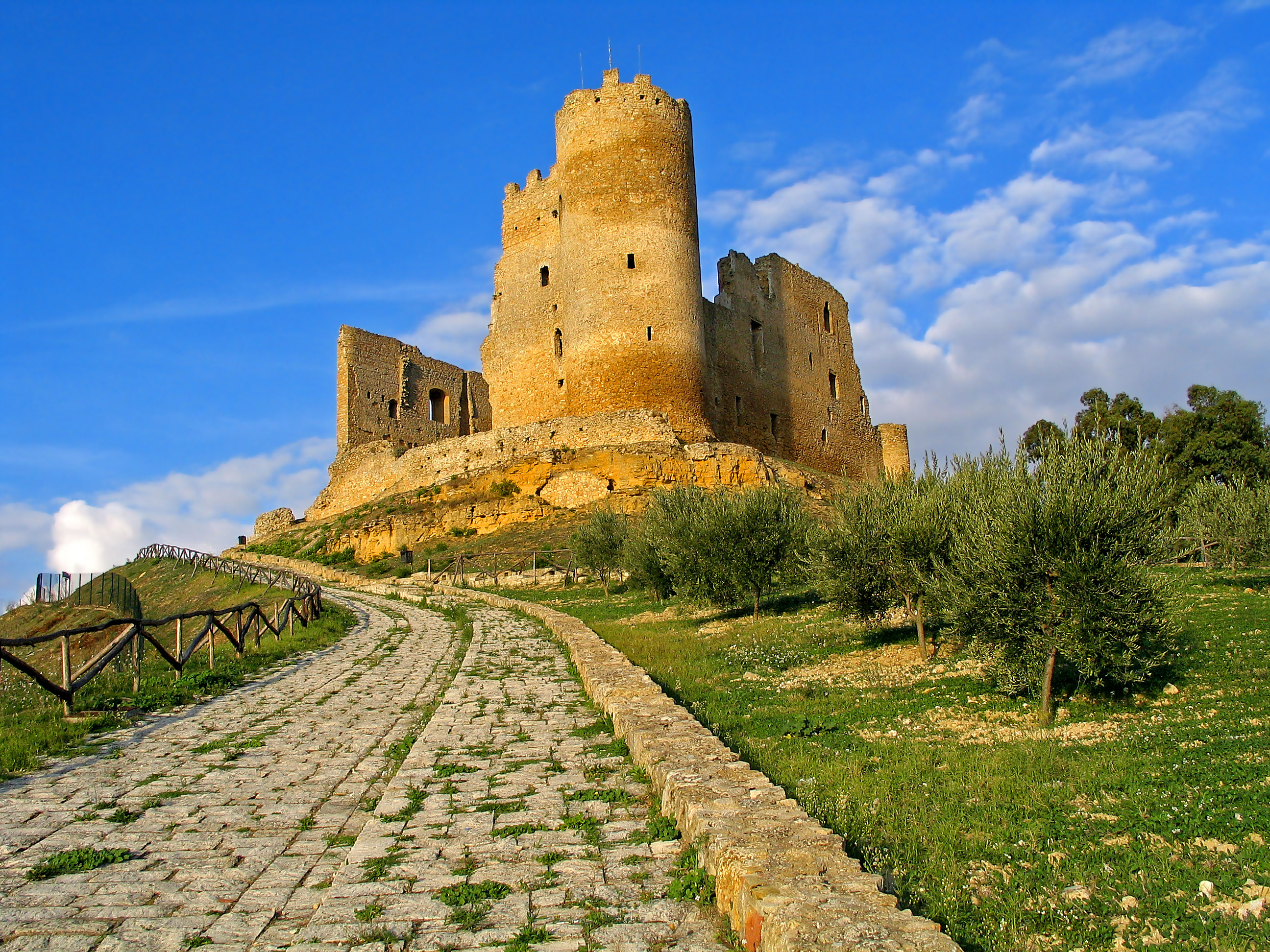 O Cannuni, Castle Mazzarino, Sicily, Italy